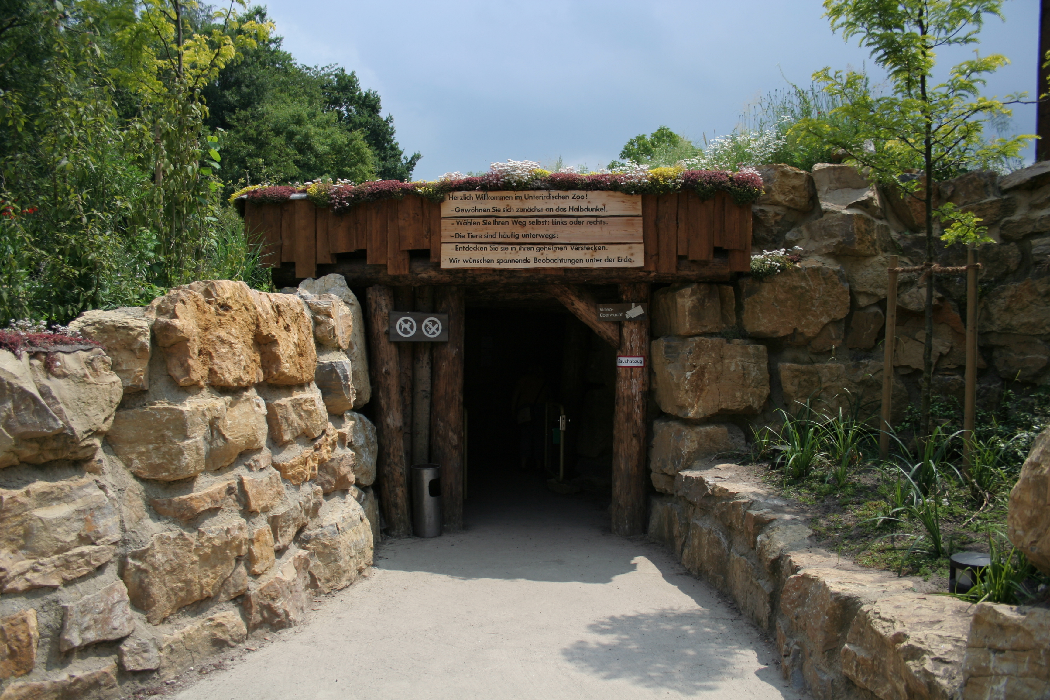 Osnabrücker Zoo. Eingang zum unterirdischen Höhlenzoo